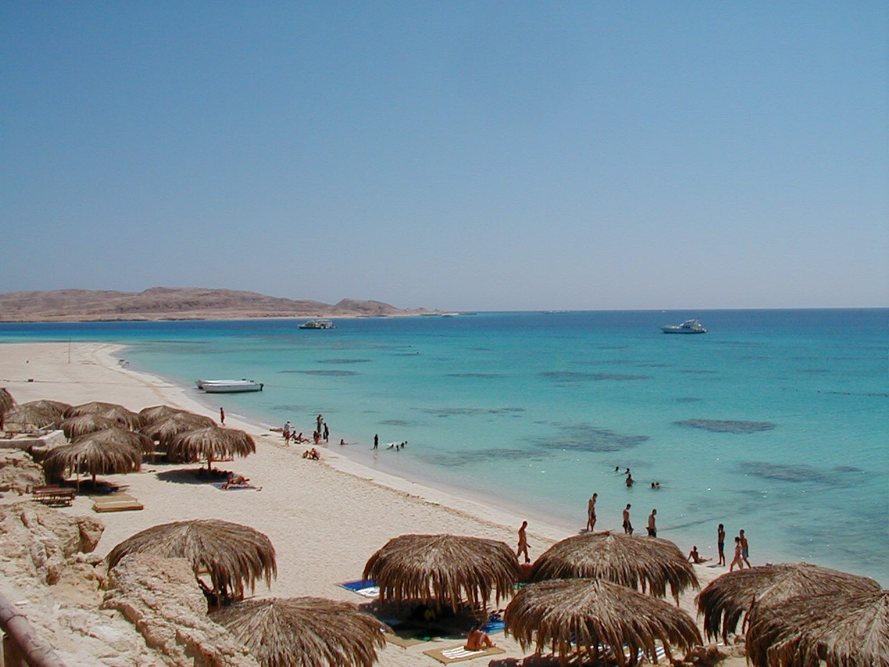 protectorate